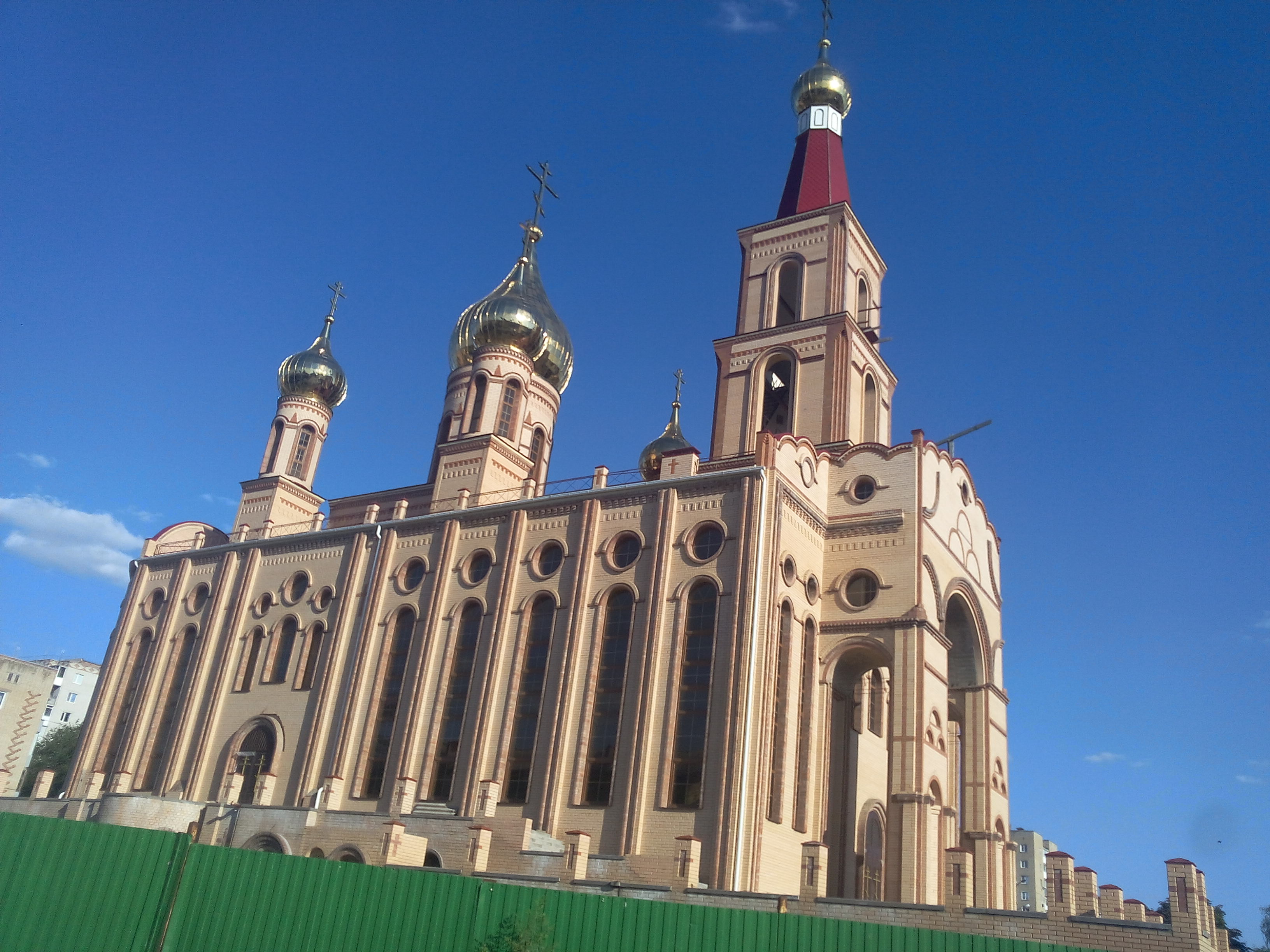 г. Сальск, Храм святых равноапостольных Кирилла и Мефодия